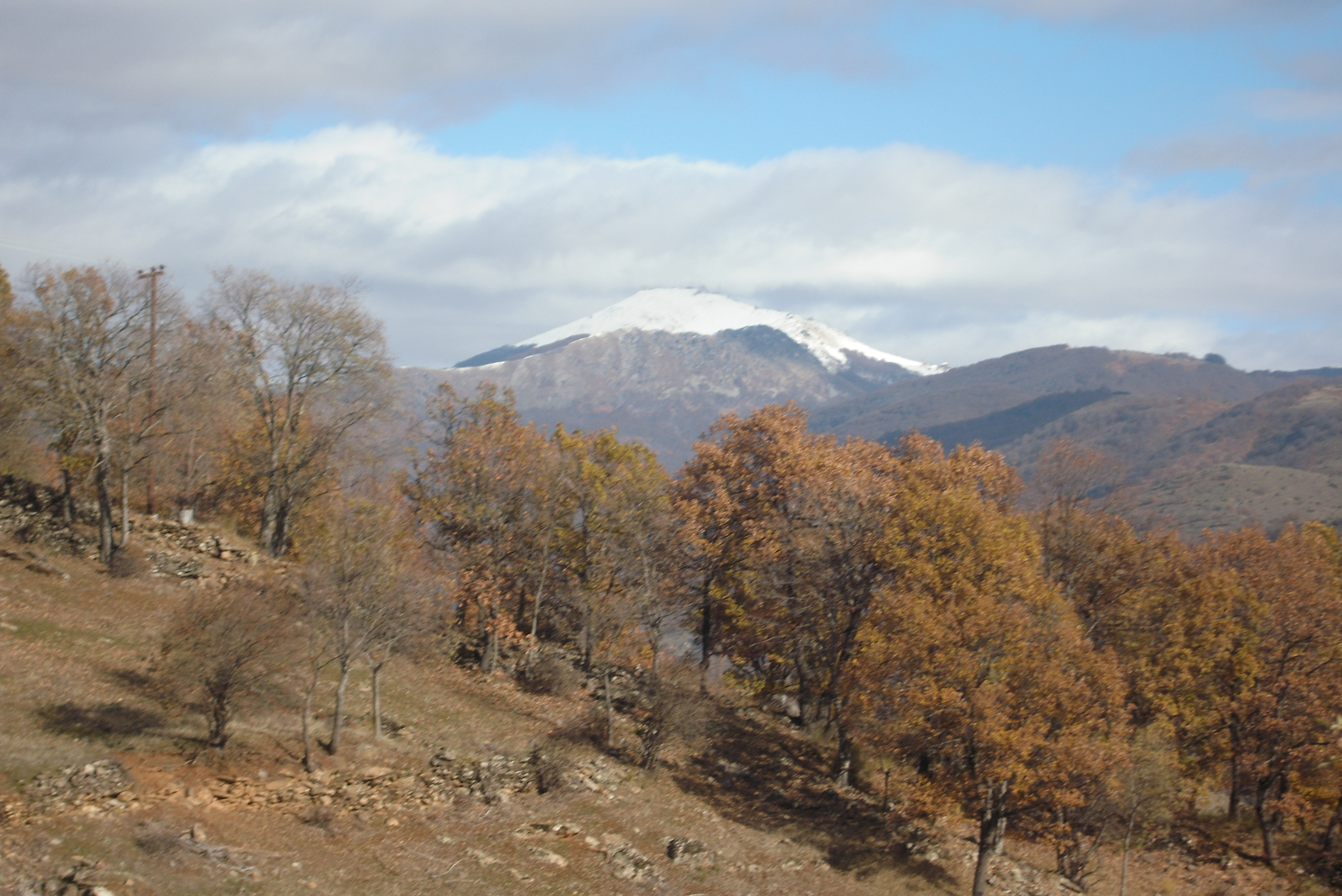 Вич от пътя Сетома - Жервени